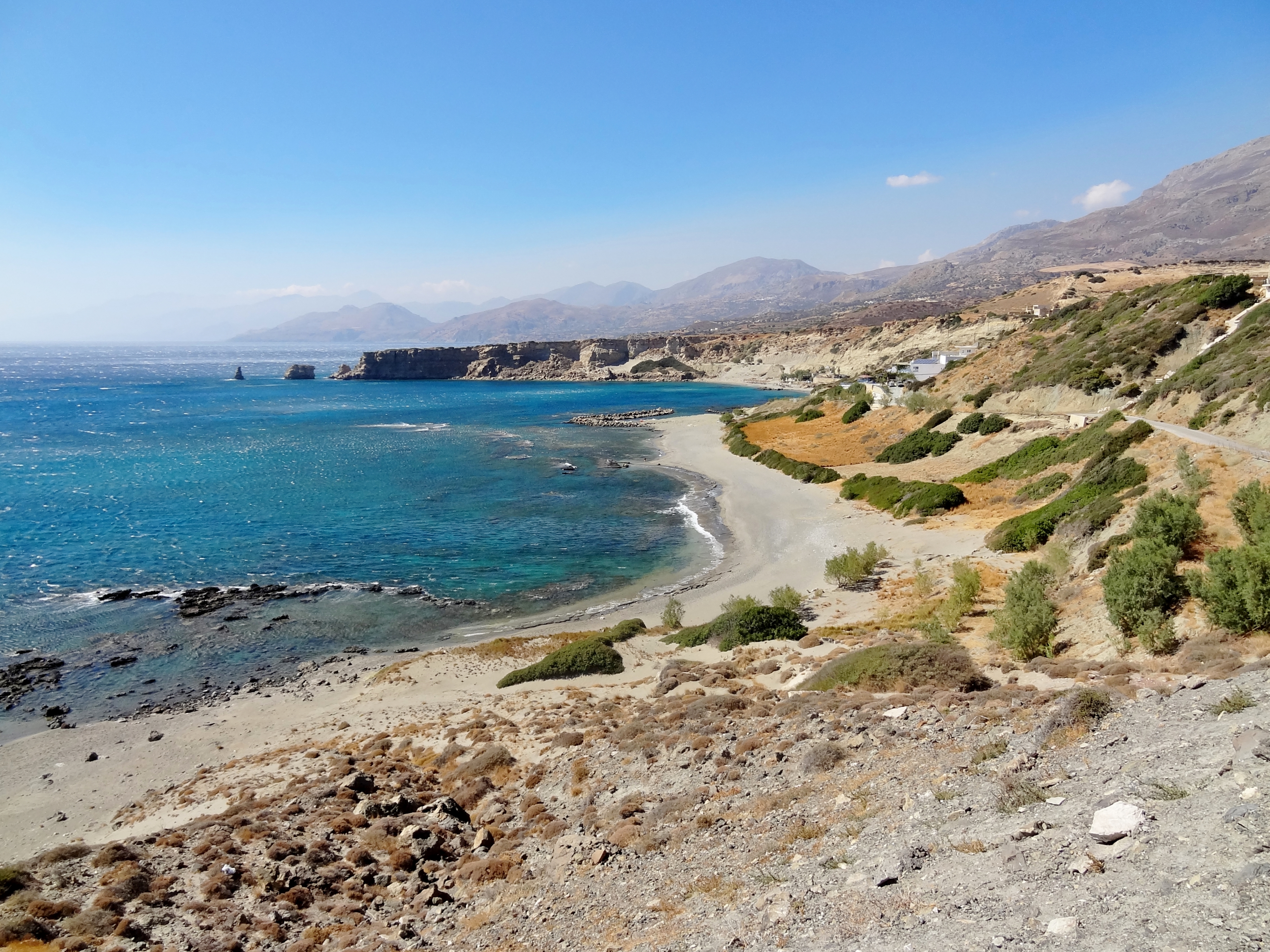 Strand von Xylokambos (Ξυλόκαμπος) bei Triopetra, Regionalbezirk Rethymno, Kreta, Griechenland